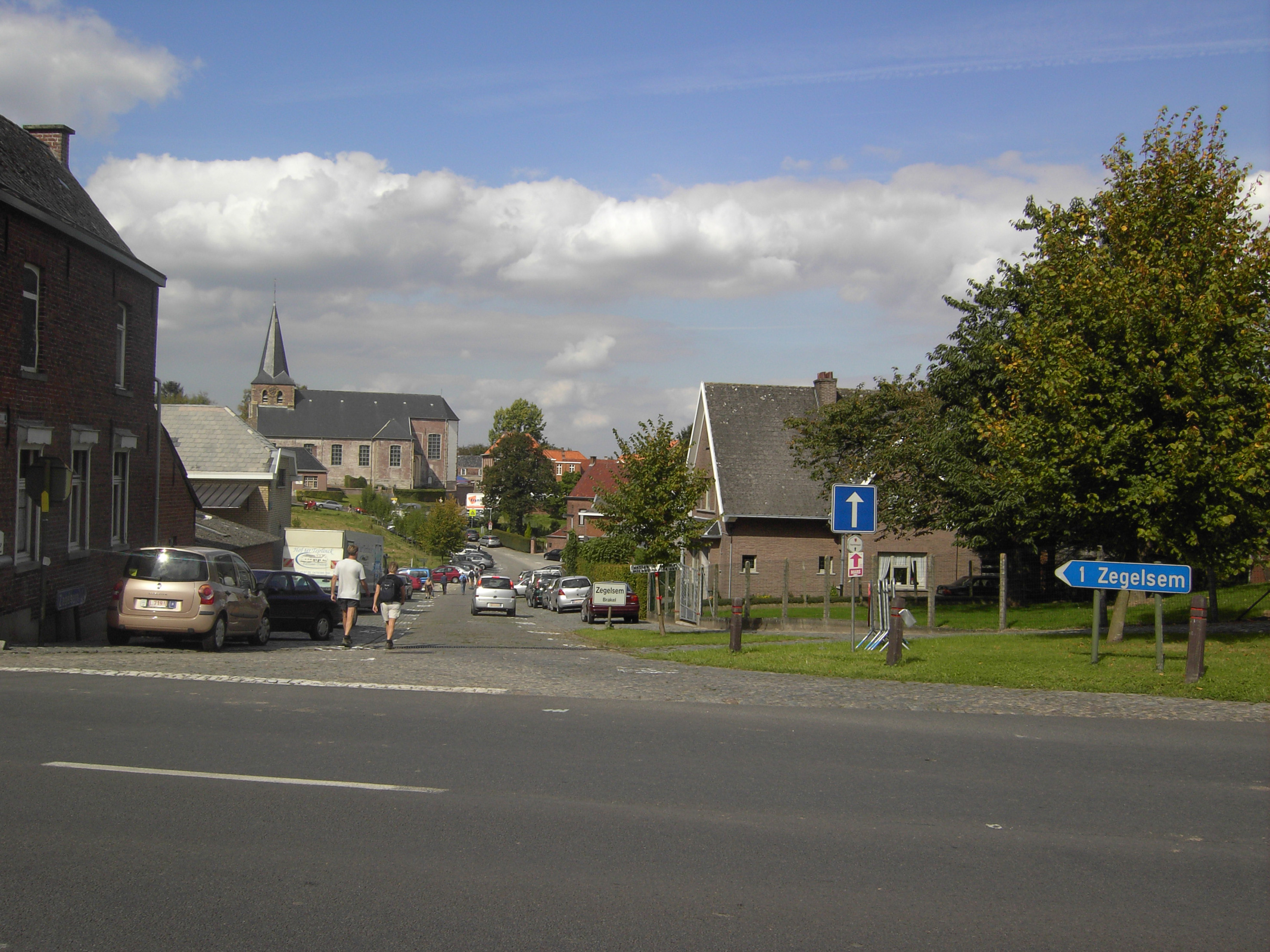 Zegelsem: Teirlinckstraat, zicht vanaf Oudenaardsestraat (N8) noordwaarts naar Sint-Ursmaruskerk op heuvel